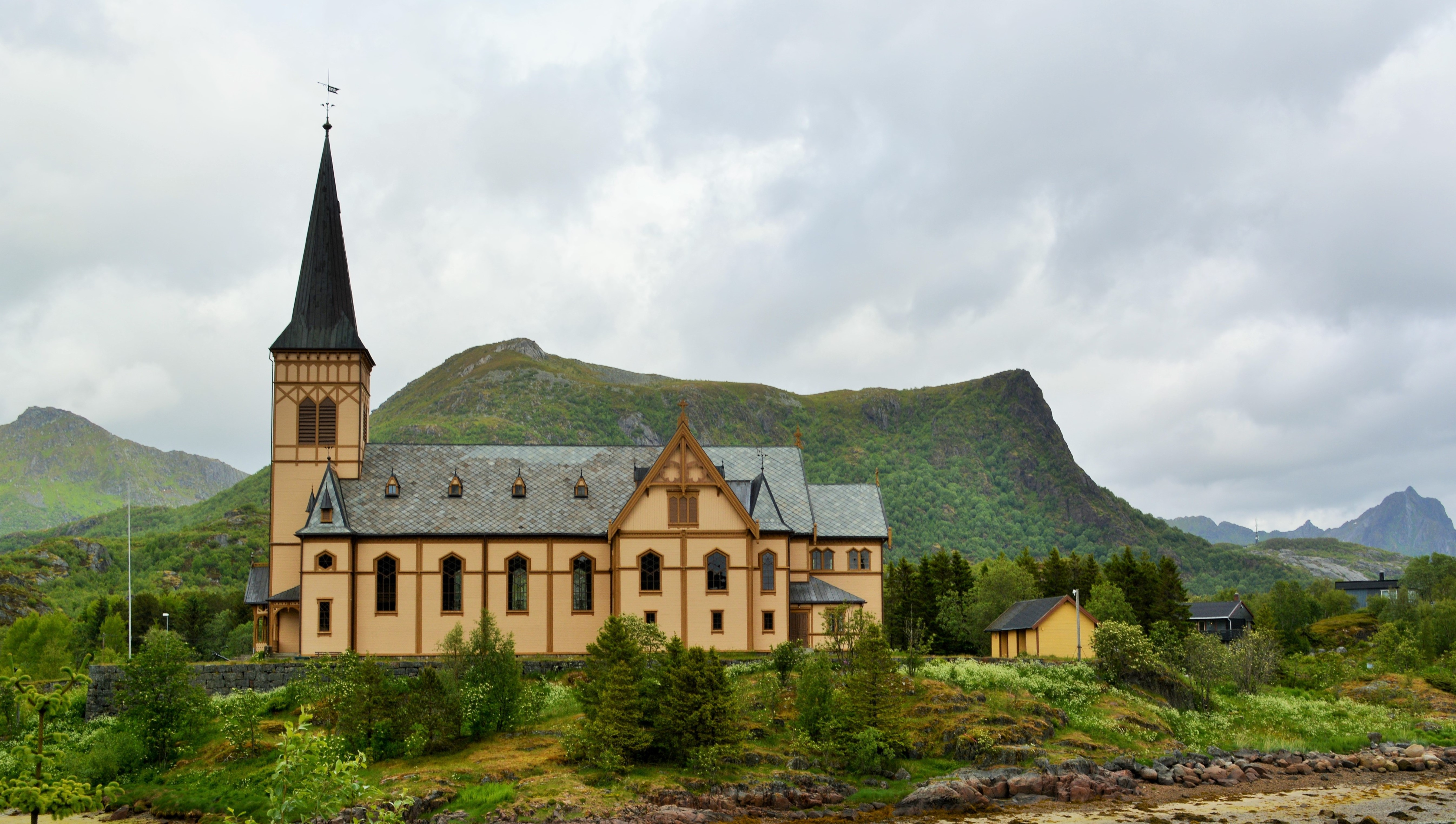 Kirche Vågan, auch Lofotenkathedrale genannt, in Kabelvåg, größte Kirche auf den Lofoten, Norwegen, erbaut 1898